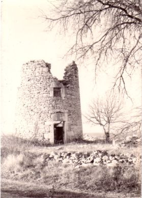 Moulin à vent du pech Granat à Saint Chels, avant 1975.